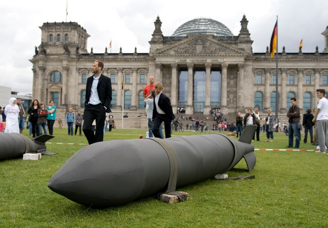 Bergungsarbeiten auf Lethe